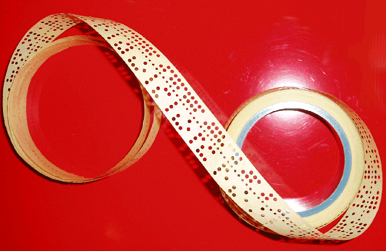 5-Bit-Lochstreifen, ca. 1976.